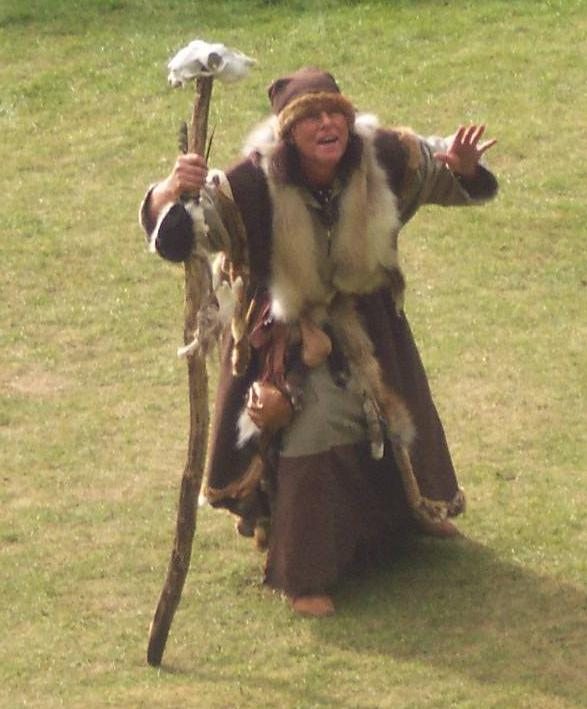 Steigen Sagaspill 2005 Ulvhild introduserer seg selv tidlig i spillet. Bilde tatt av Mari Pedersen med Bruker:ThorRune's kamera.